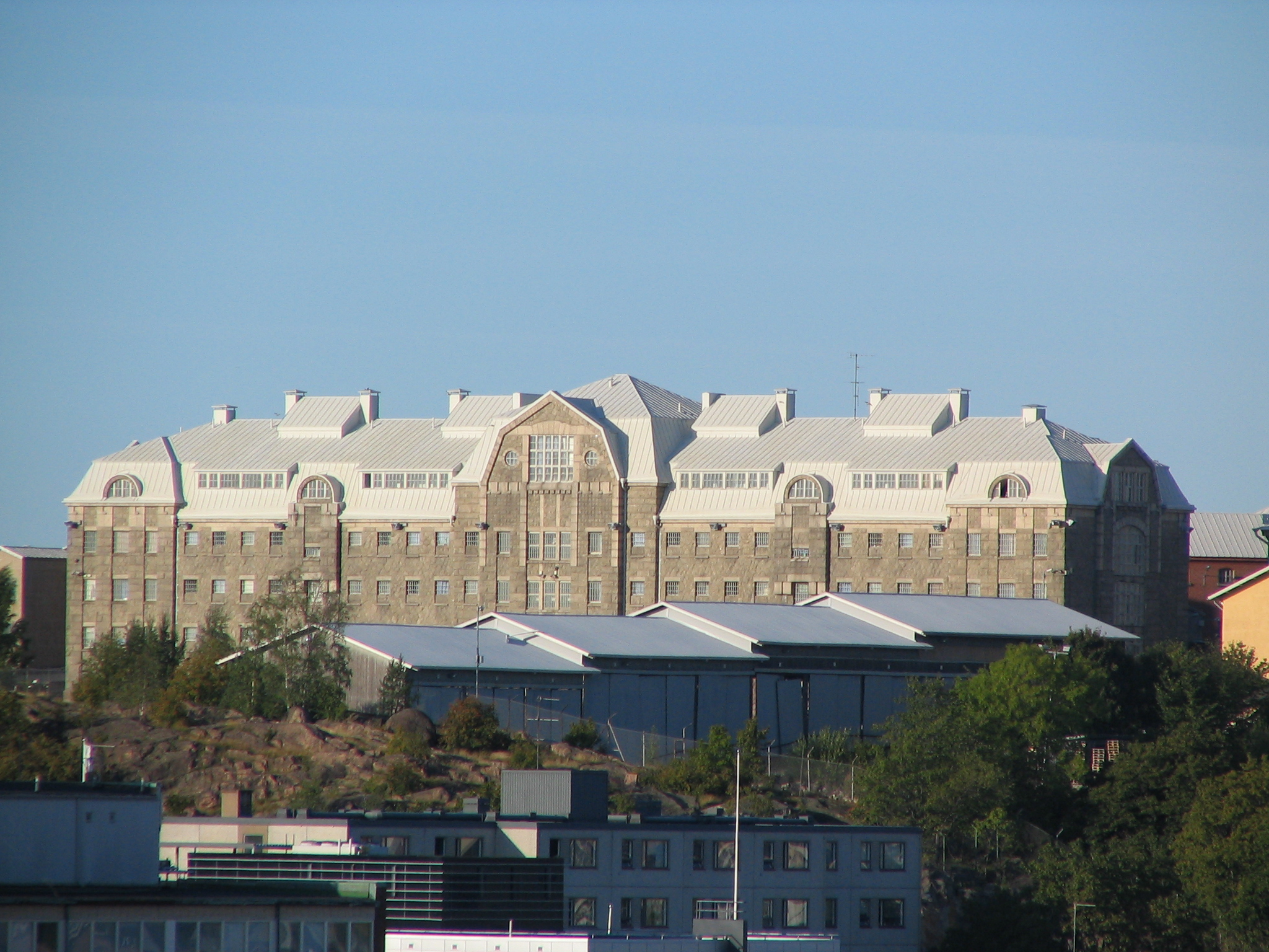 Old prison of Turku (Turun vankila)